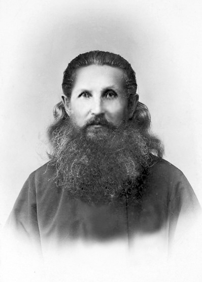 Яков Емельянов, кряшенский свяшенник, поэт, учитель